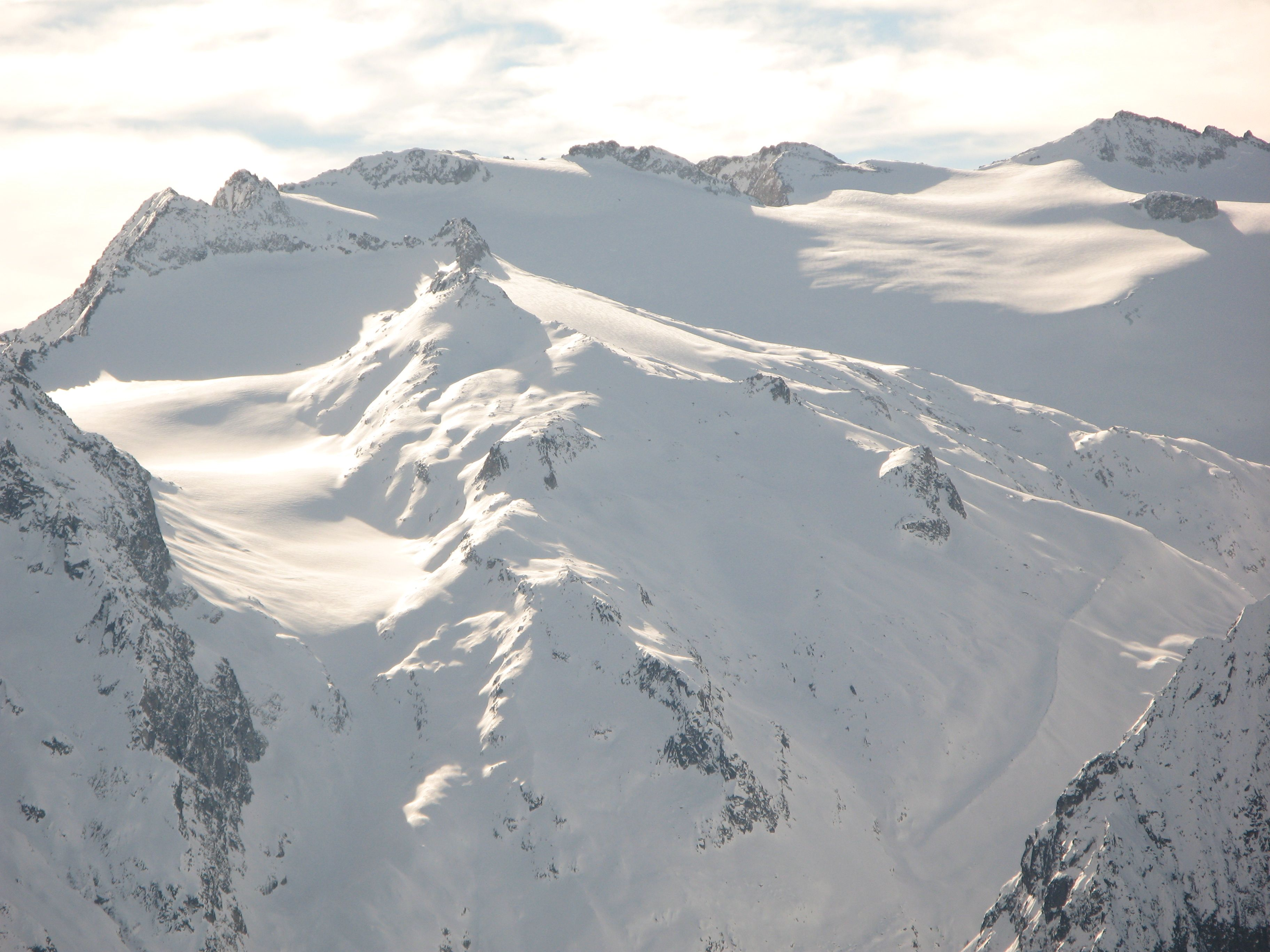 Monte Adamello 3554m